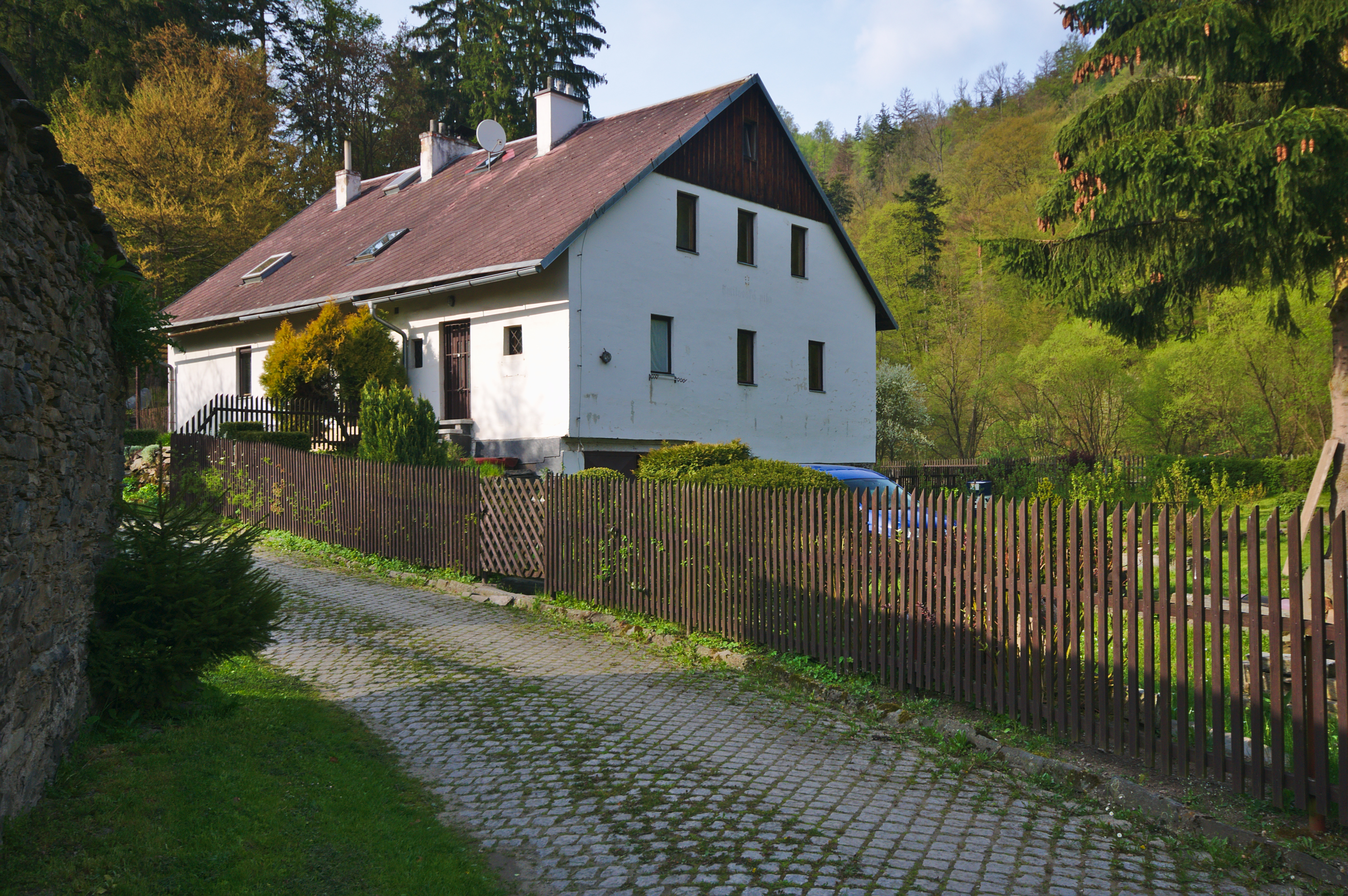 Smilovský mlýn, Hrubá Voda, Hlubočky, okres Olomouc